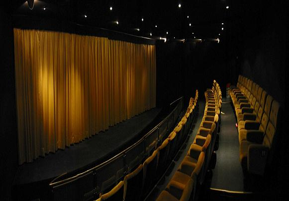 Gabriel Filmtheater München - Kino 2 (2011)